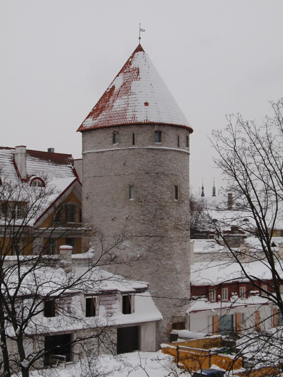 Eppingi torn Tallinna linnamüüris.